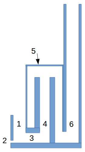 Plan of Rocket stove